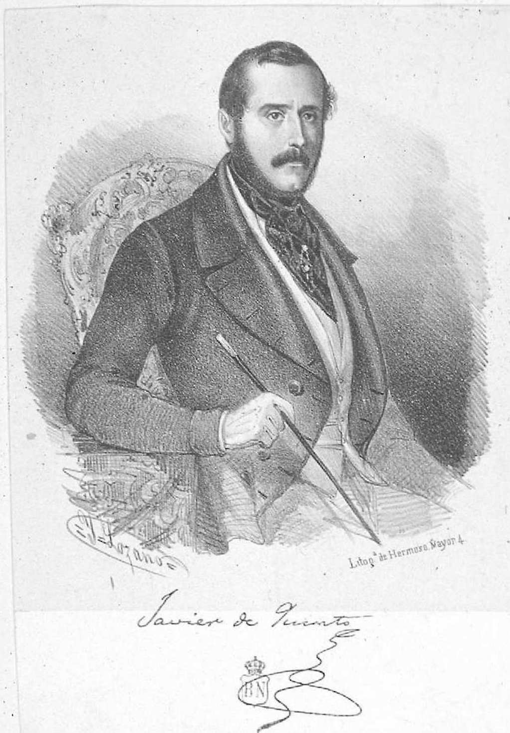 Javier de Quinto, litografía de Isidoro Lozano. Biblioteca Nacional de España